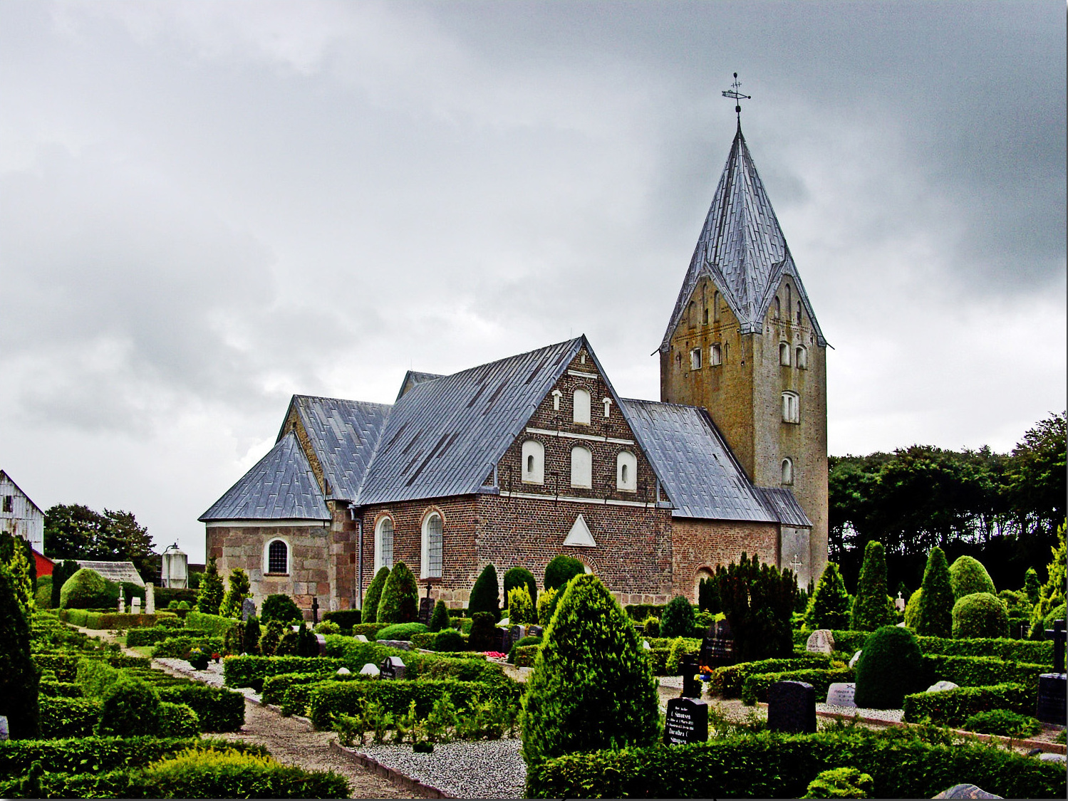 fra nordøst